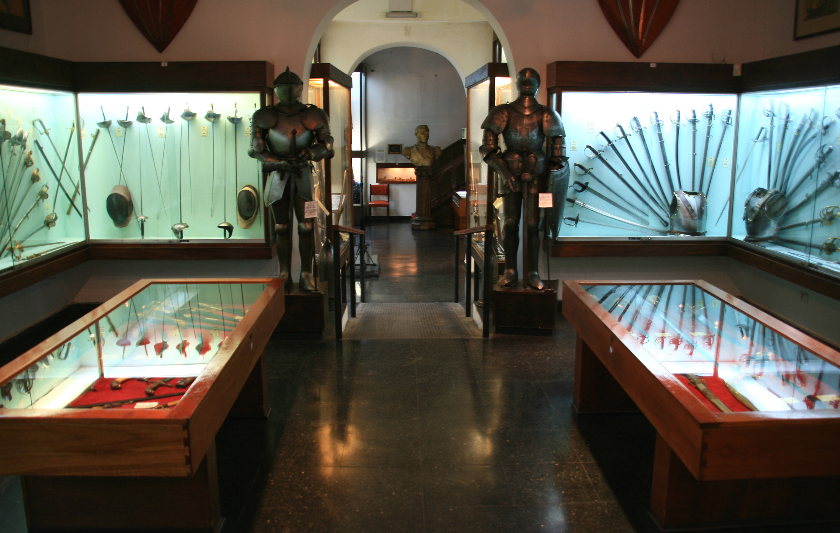 Exhibition hall, Museo de Armas de la Nacion, Buenos Aires.